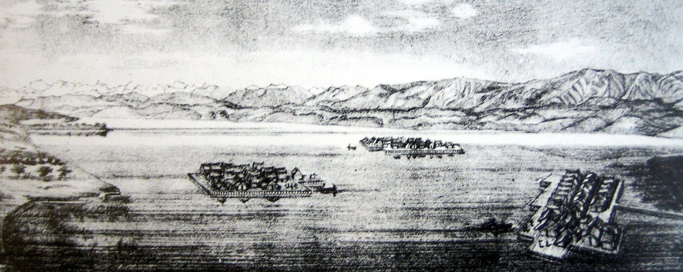 Zürich : Romantisierende Darstellung des Grossen (Bildmitte) und Kleinen Hafners im unteren Zürichseebecken, rechts das heutige Bauschänzli. Zeichnung von Ferdinand Keller (1800 - 1881).